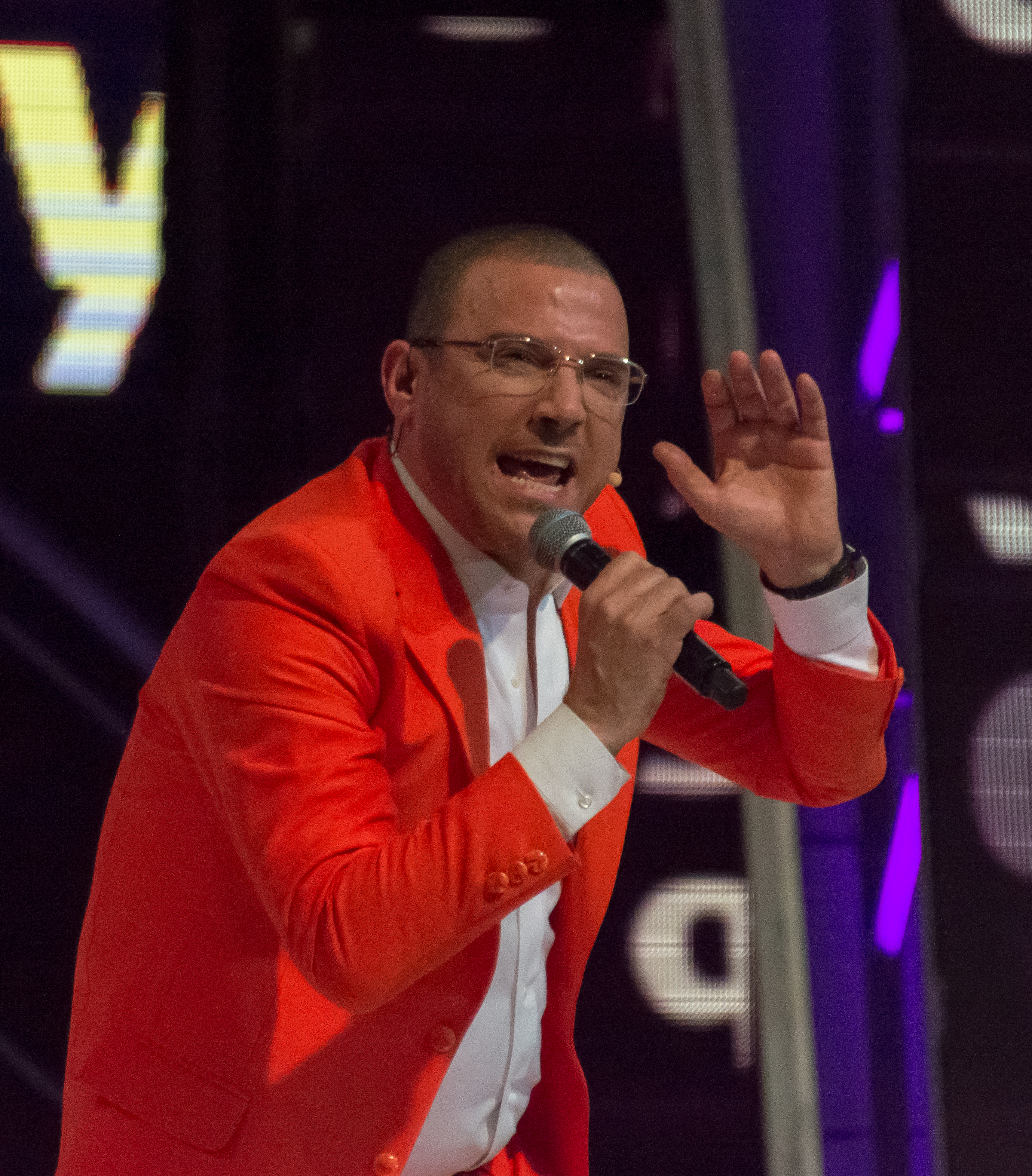 Julián Elfenbein, Teletón 2018, Teatro Teletón, Santiago, Chile.